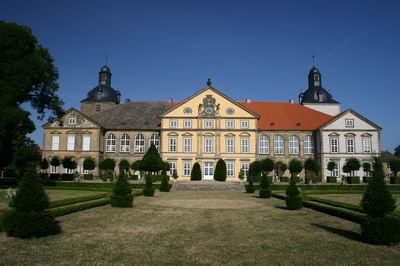 Schloss Hundisburg, public domain, eigenes Foto von 2006 Mewes